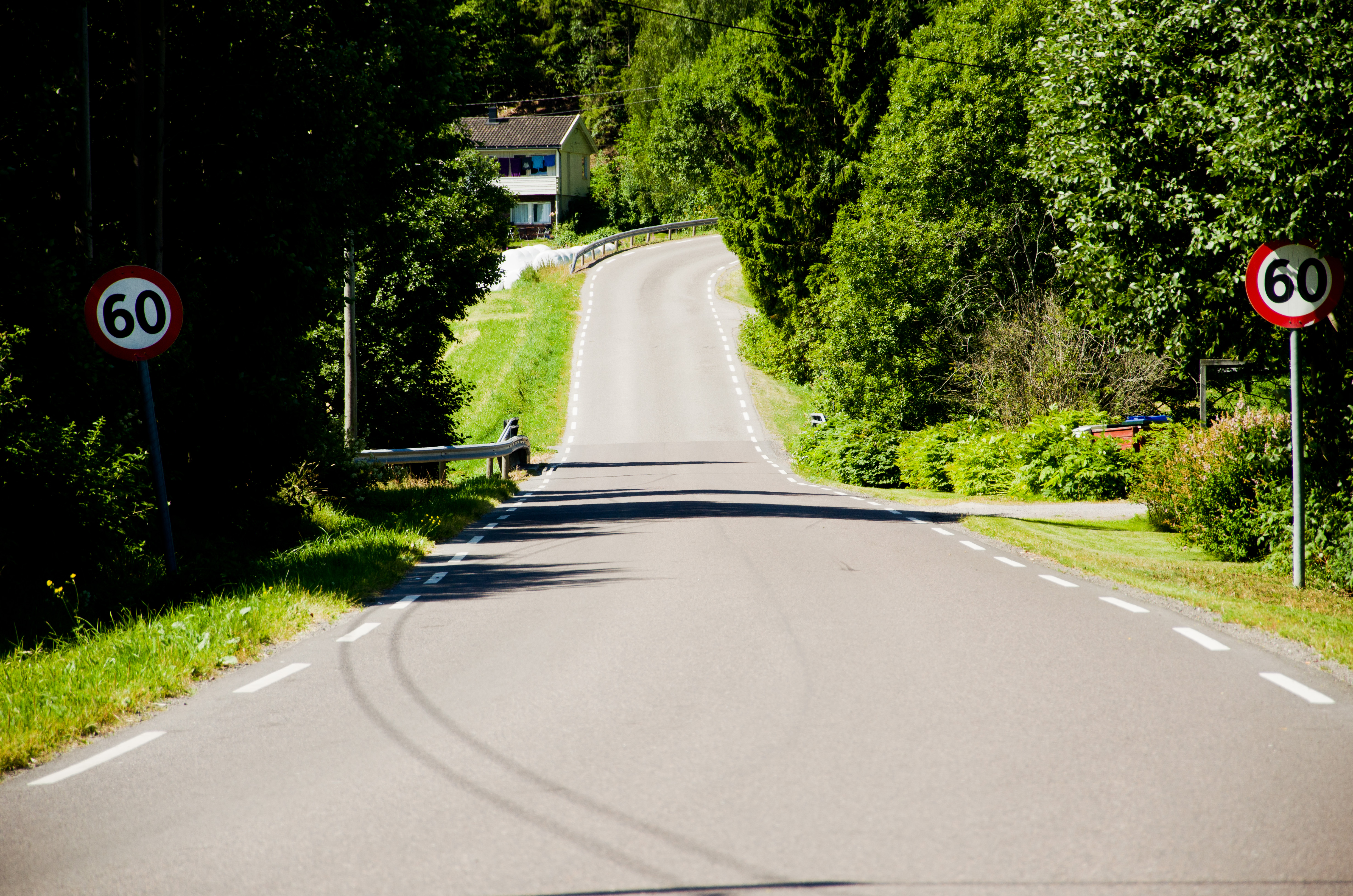 Fylkesvei 680 Hvitstenveien i Re, Vestfold